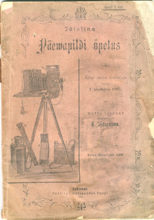 Täieline Päevapildi õpetus